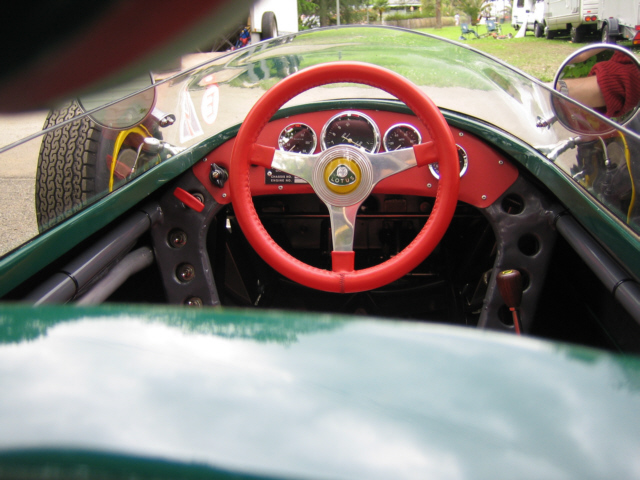 Lotus 22 inside picture Pau GP 2007